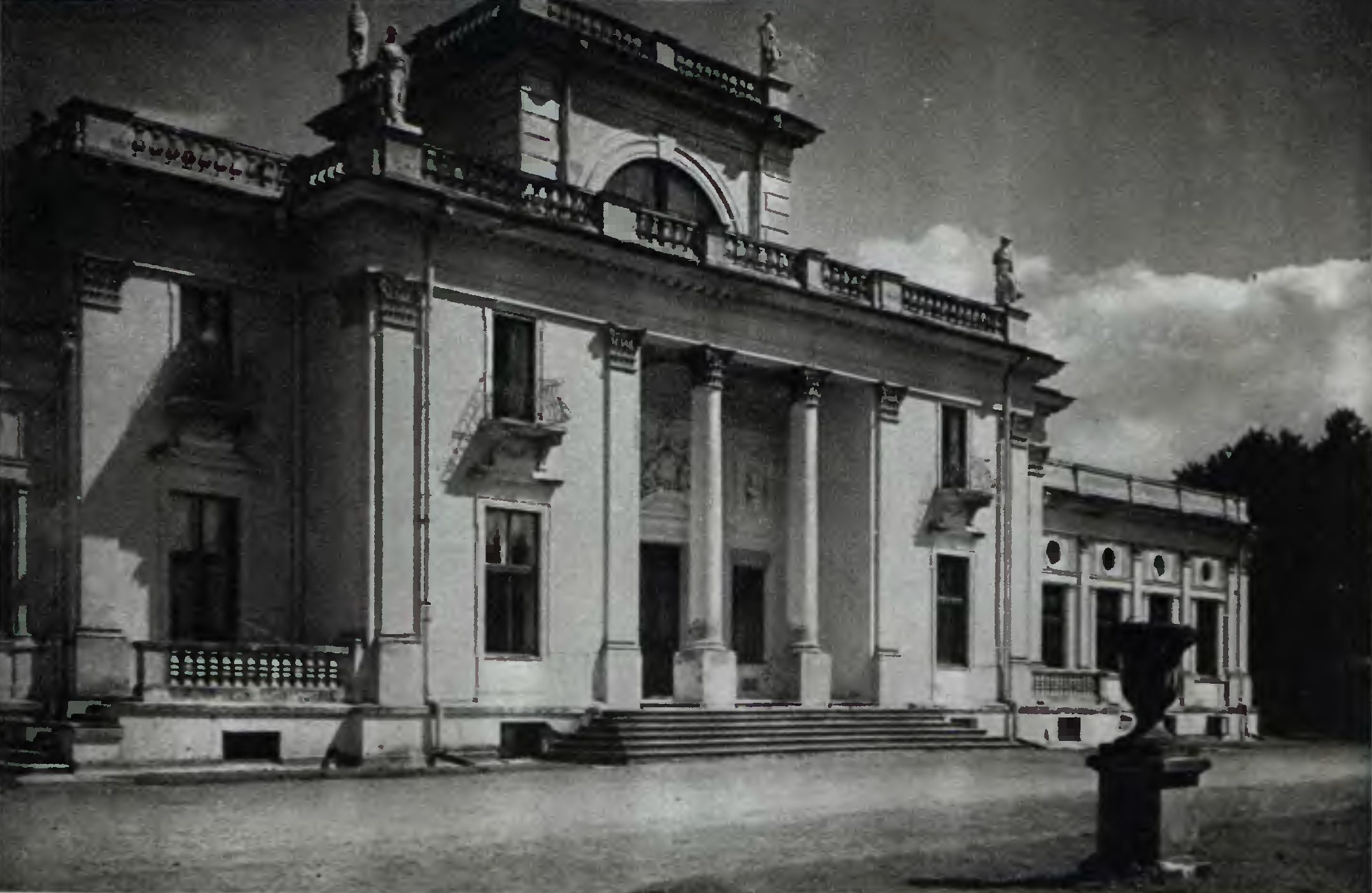 Беларуская (тарашкевіца): Вака (Vaka), сядзіба Тышкевічаў (Tyškievič)